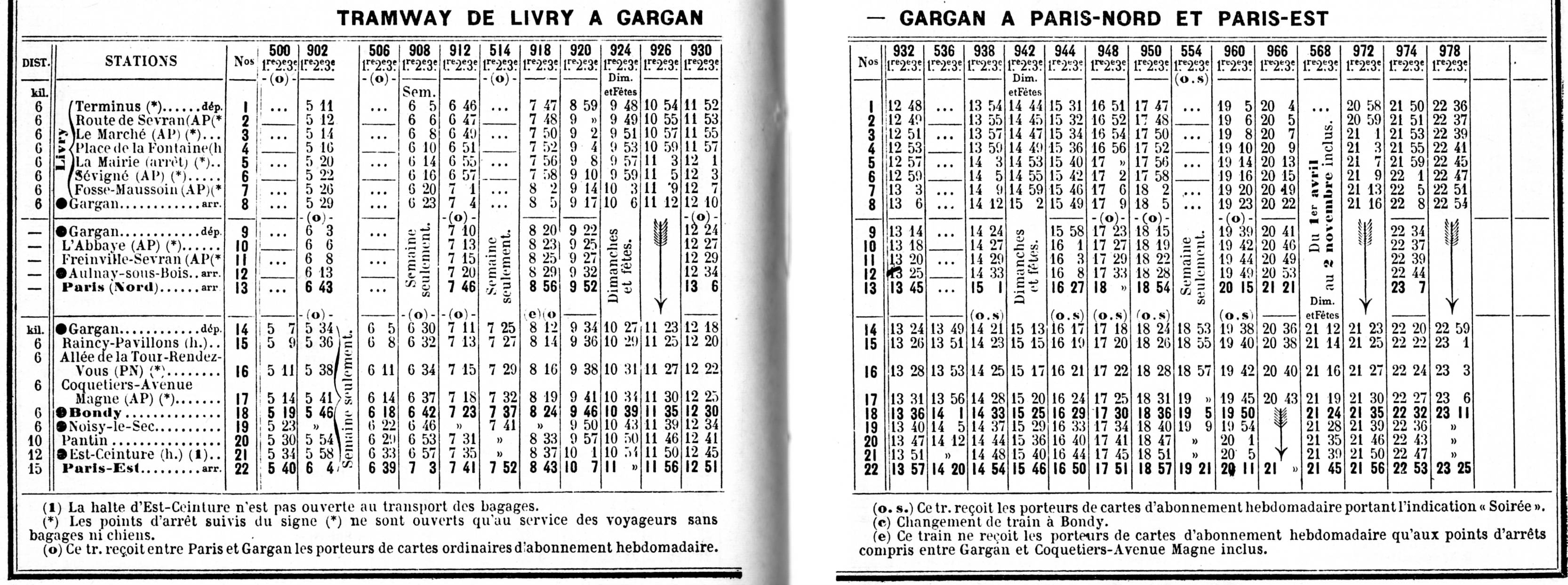 Horaires 1914 de la Cie de Tramway Gargan-Livry et de la Ligne des Coquetiers